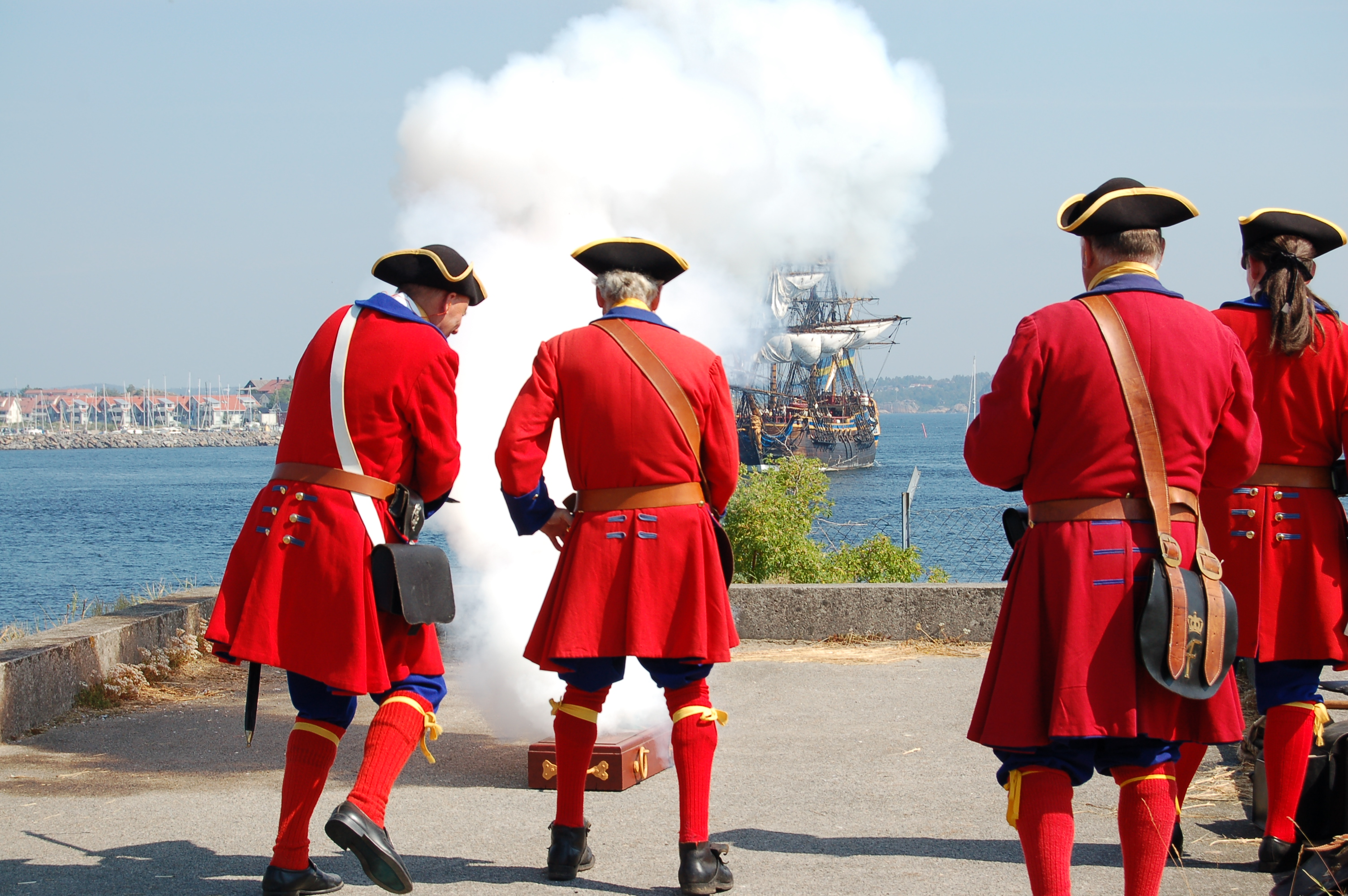 Slaget ved Dynekilen - rekonstruksjon i Stavern (Fredriksvern). Tordenskiolds soldater. "Götheborg" (replika)